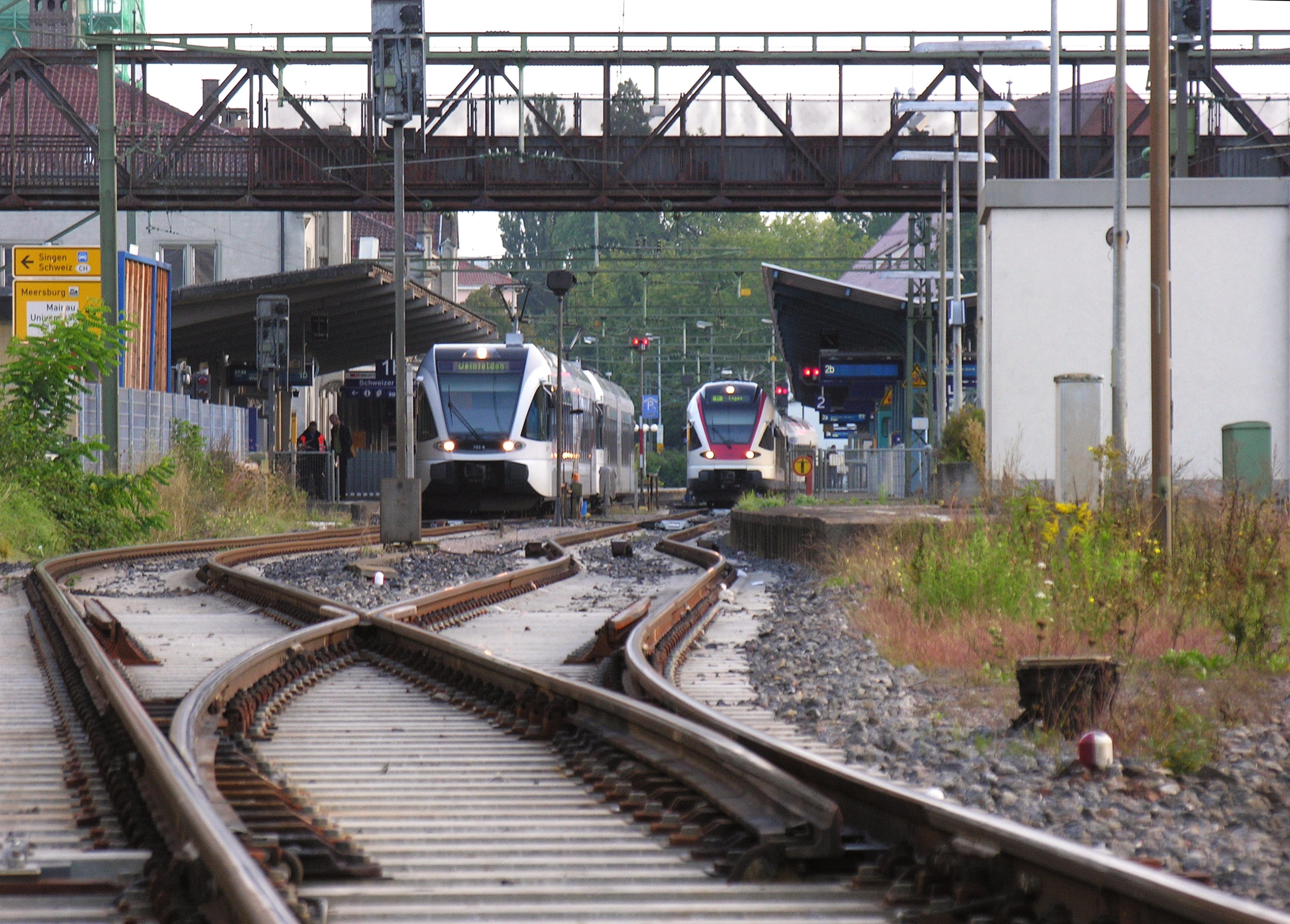 Der Bahnhof in Konstanz am Bodensee in Baden-Württemberg mit der Nutzung duch die DB, SBB und Thurbo, Bahnsteigseite - Foto Wolfgang Pehlemann DSCN9068.jpg